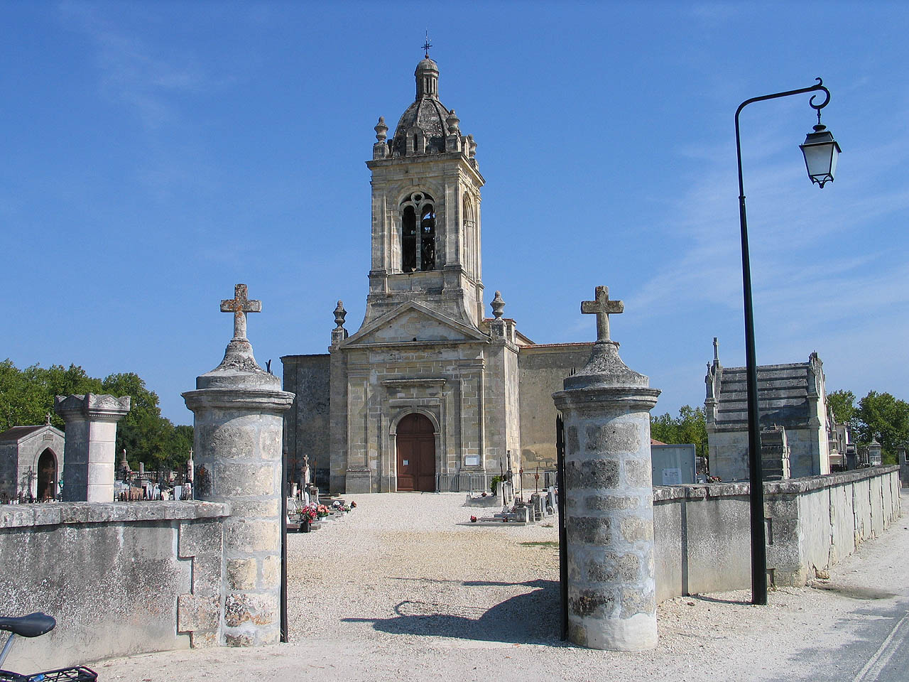 Église, Margaux, Médoc, France, Frankfreich (2. September 2005) Photograph: Luidger